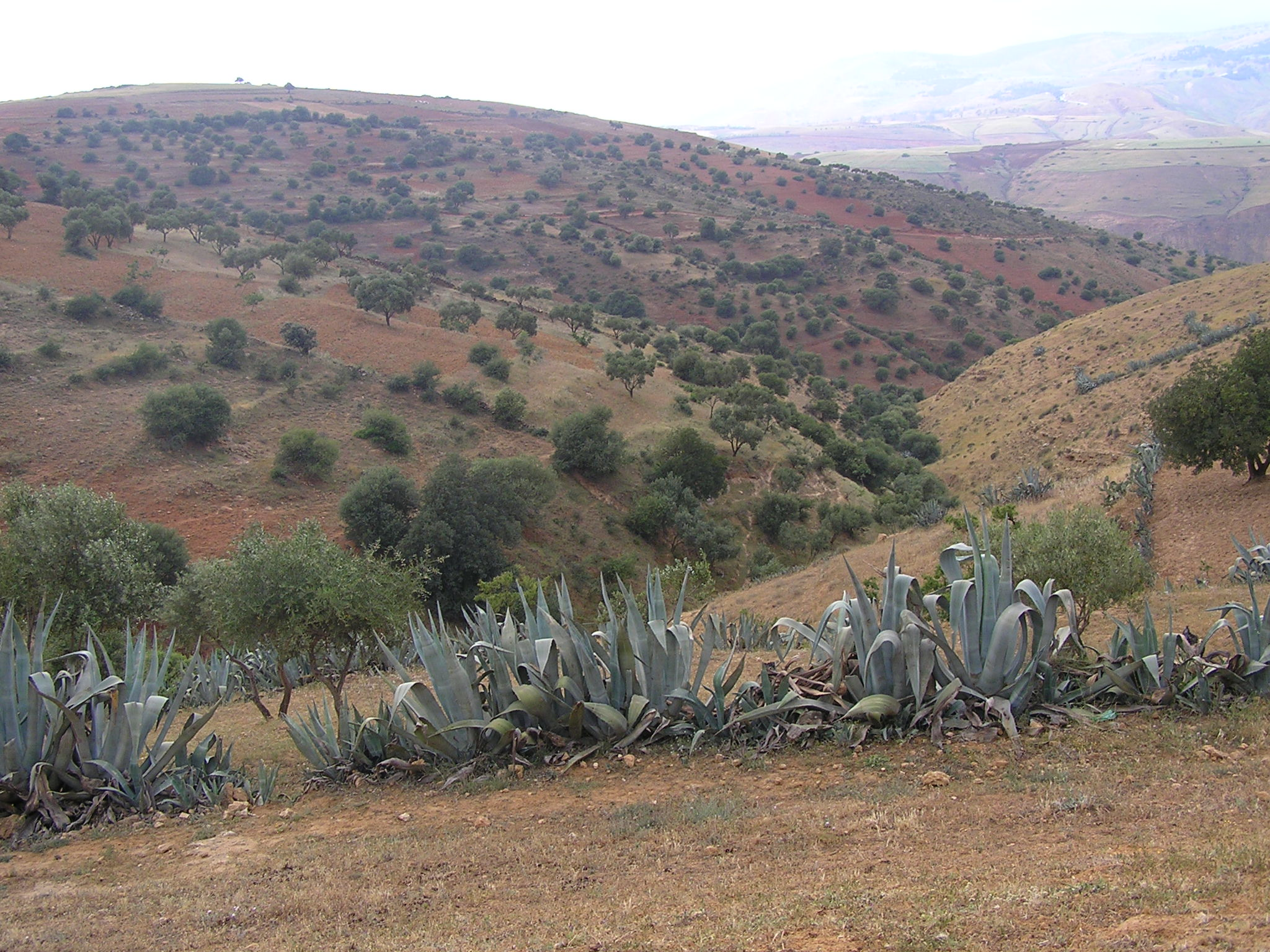 Commune de Ouarizane, Wilaya de Relizane, Algérie.